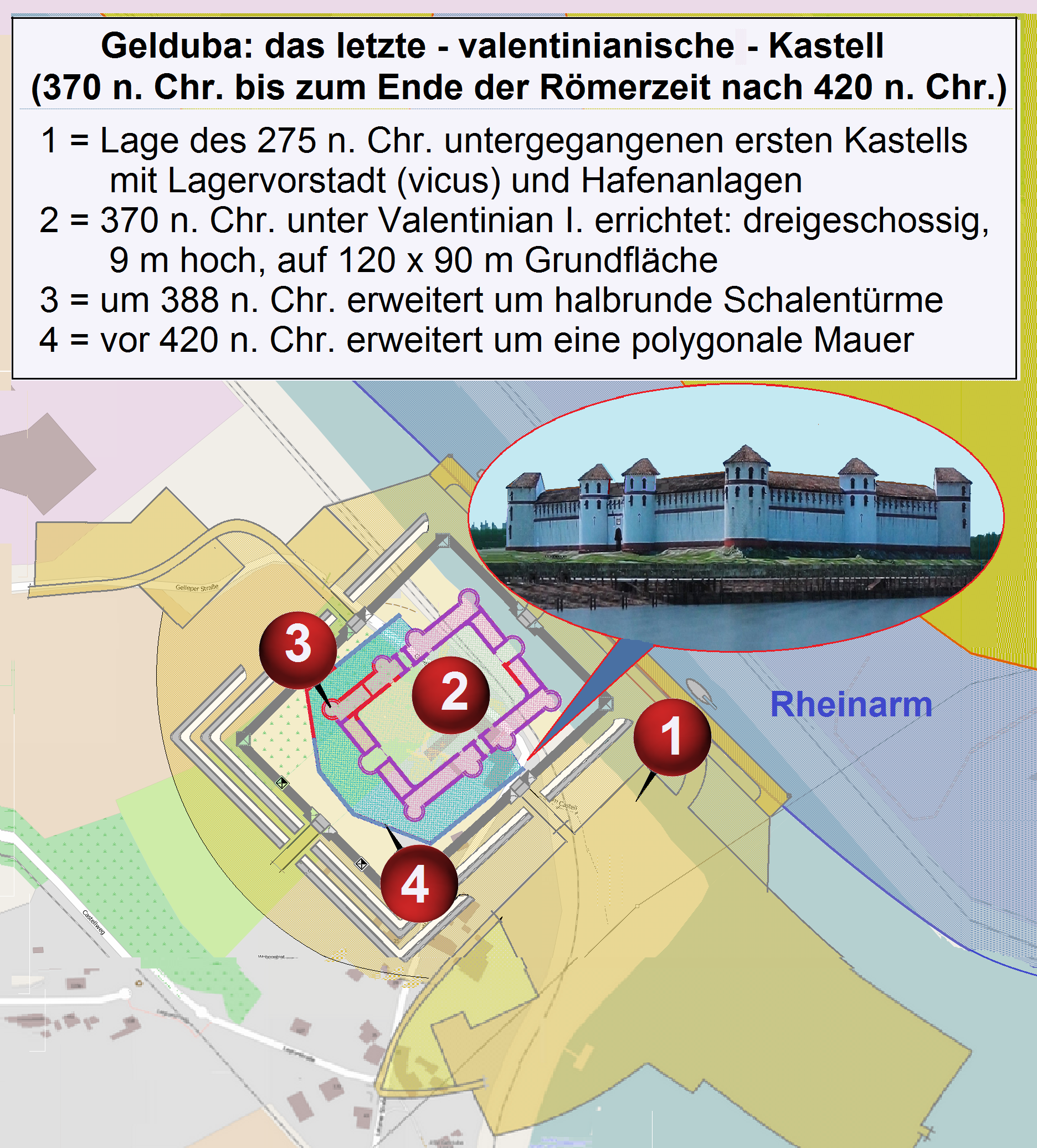 Gelduba Kastell um 370 n. Chr. This map of Krefeld-Gellep Gelduba Kastell um 370 n. Chr. was created from OpenStreetMap project data, collected by the community. This map may be incomplete, and may contain errors. Don't rely solely on it for navigation.